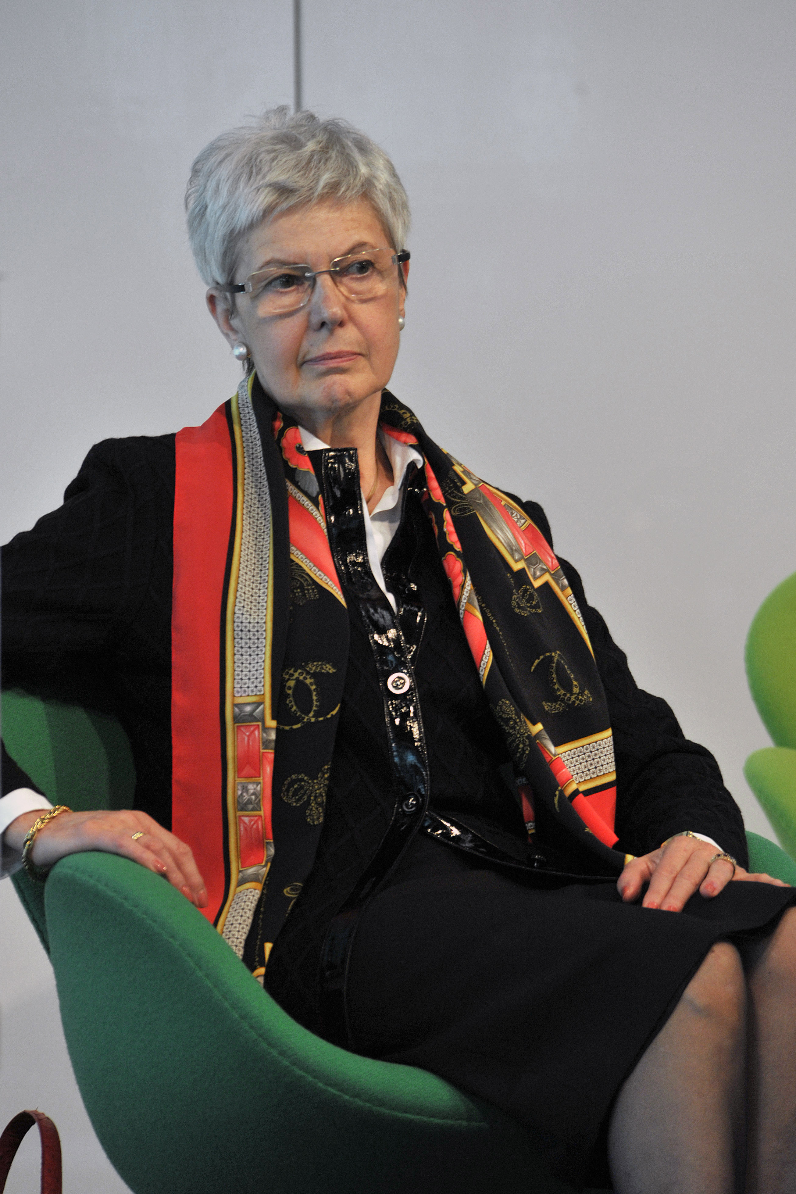 Elke Baezner, Präsidentin der Deutschen Gesellschaft für Humanes Sterben (DGHS e.V.) Berlin Foto: Heinrich-Böll-Stiftung/xpress